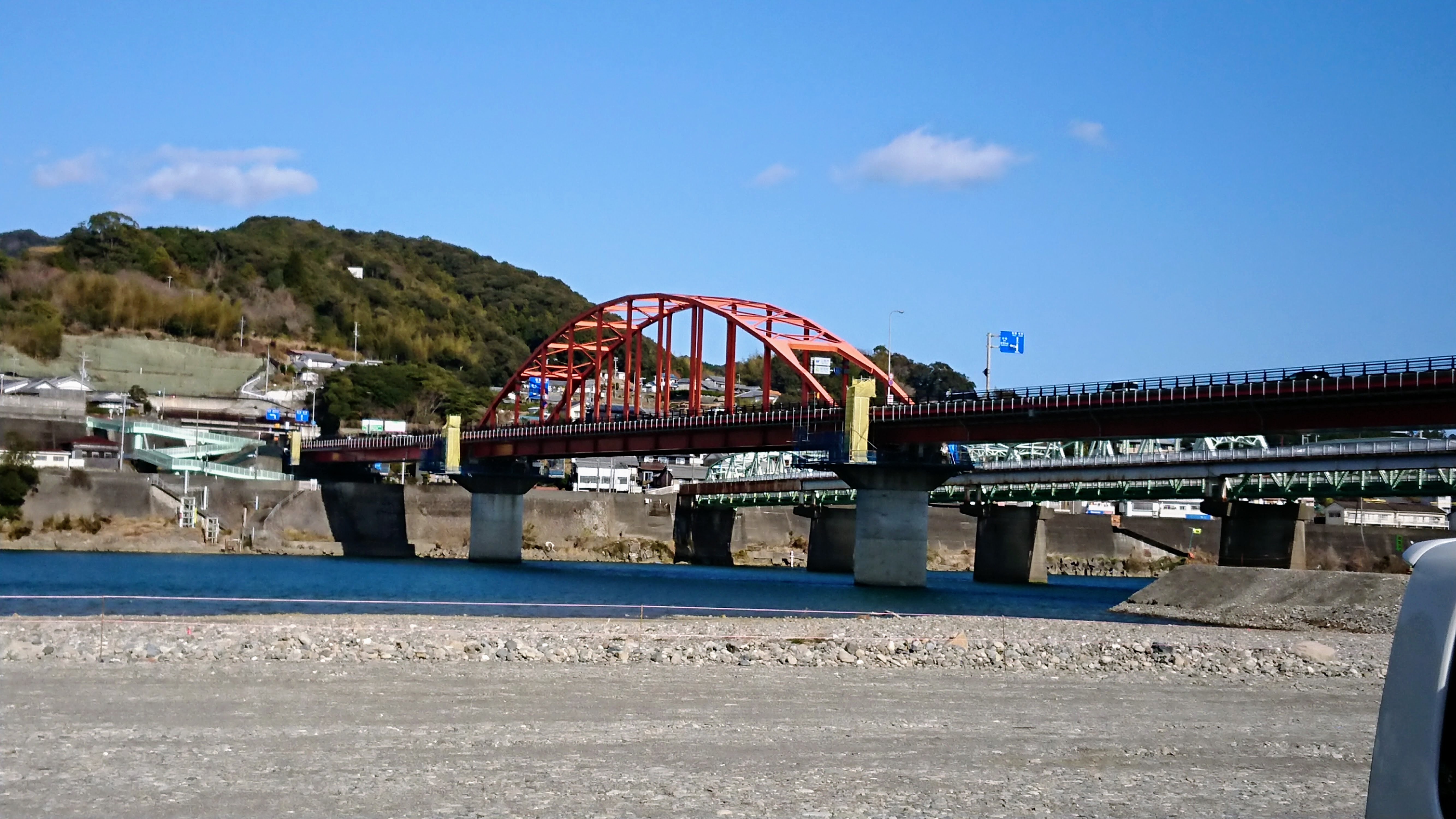 新熊野大橋（和歌山県新宮市）は熊野川にかかる橋。国道42号線の一部。